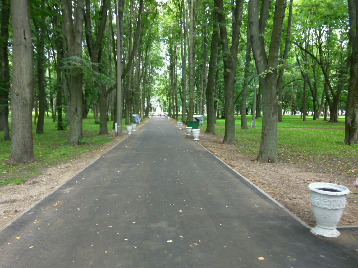 Мінск. Парк па вул. Пляханава